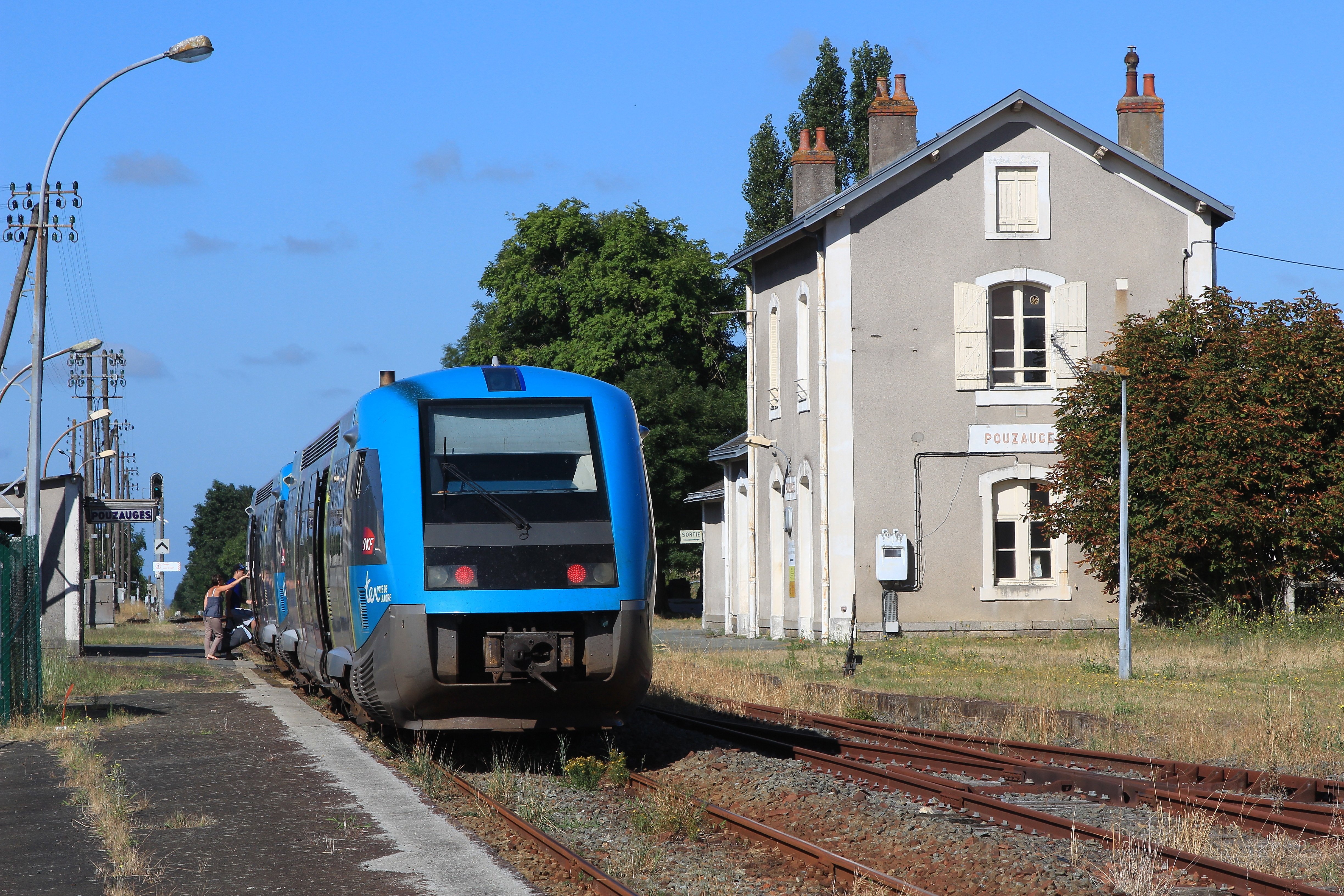 Le train des plages reliant Saumur aux Sables-d'Olonne en gare de Pouzauges.